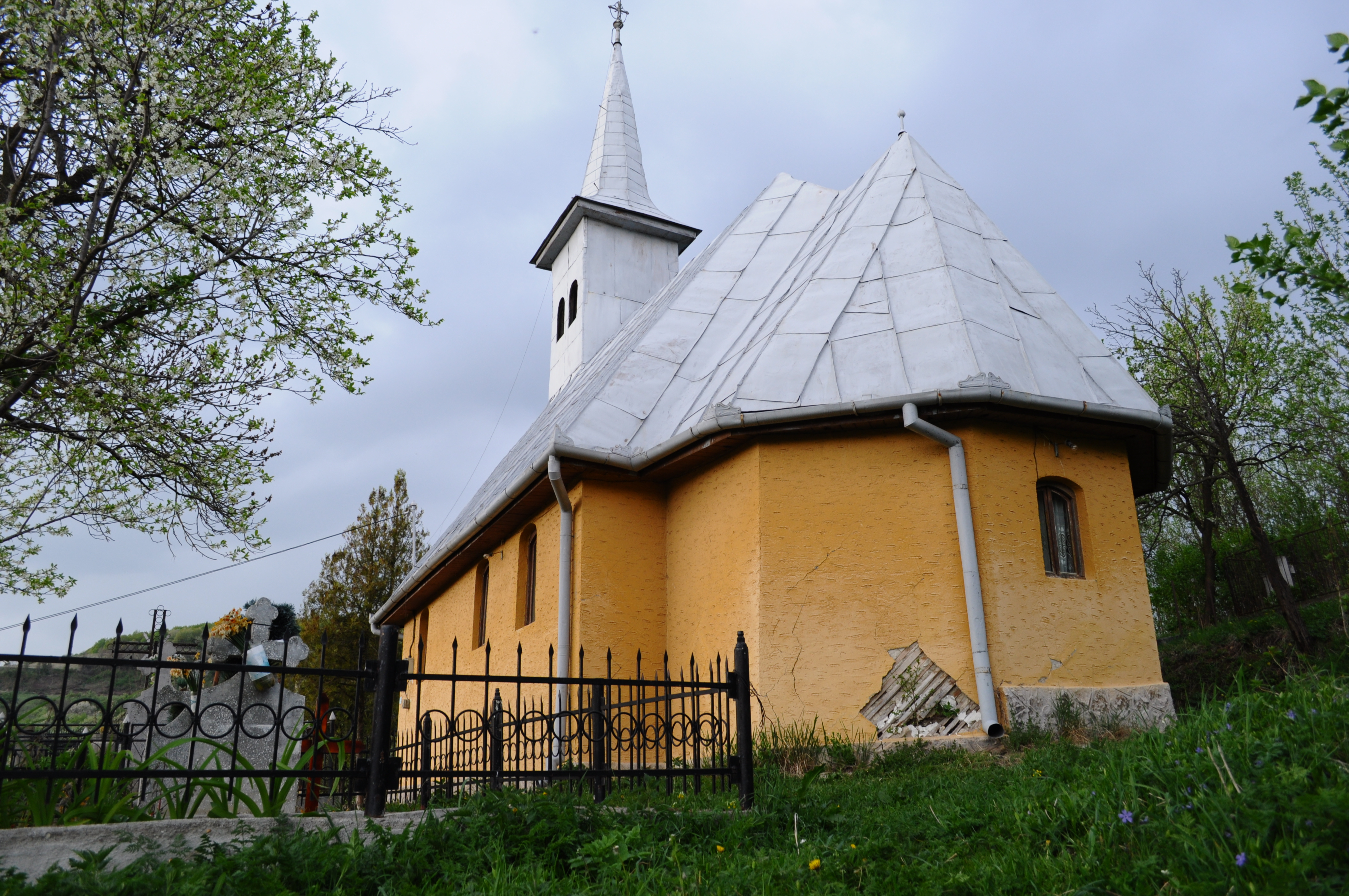 Biserica de lemn din Ciurila, județul Cluj